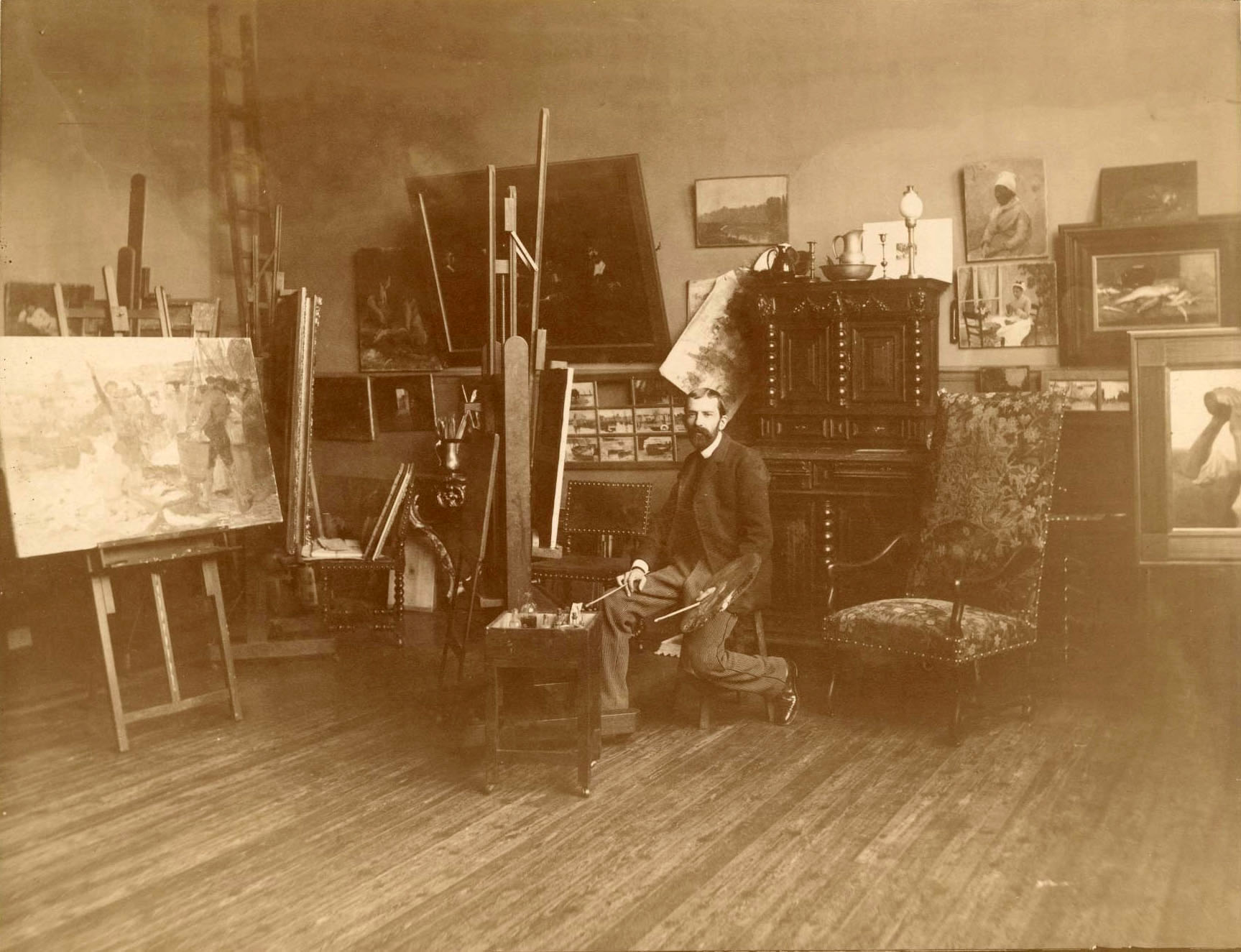 Victor Gabriel Gilbert dans son atelier